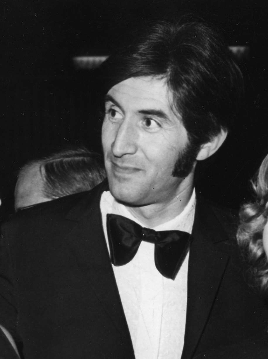 Milena Dravic, Ljubisa Samardzic, Bata Zivoinovic, Bitka na Neretvi, premijera. Autor fotografije Stevan Kragujević (po odobrenju Tanje Kragujević)